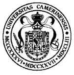 Logo dell'Università degli Studi di Camerino